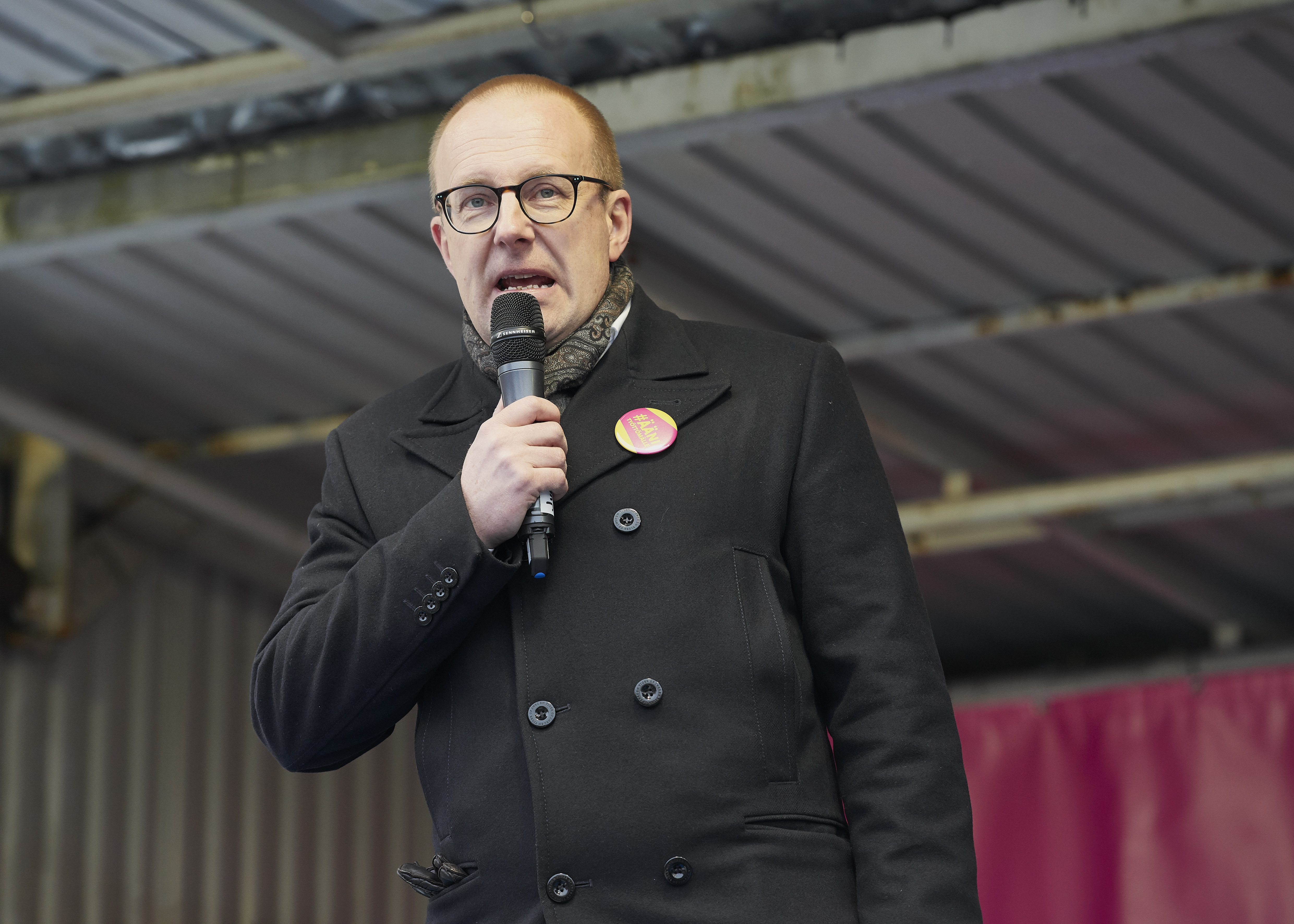 Jarkko Eloranta (1966–) puhuu aktiivimallin vastaisessa mielenilmauksessa Senaatintorilla. (Suomen suurin palkansaajajärjestö SAK järjesti Senaatintorilla mielenosoituksen työttömyysturvan aktiivimallia vastaan.)